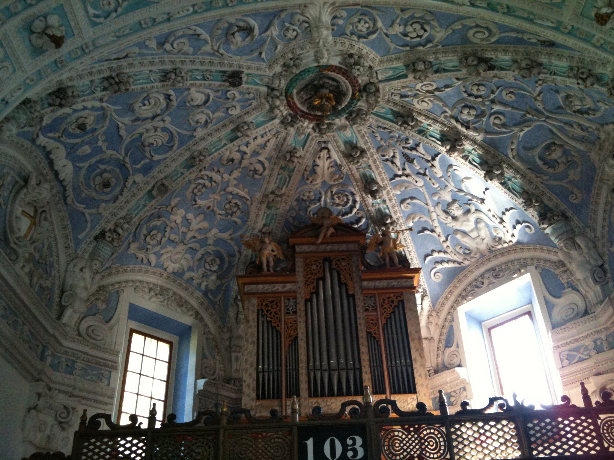 Empore mit Orgel und Chorraumdecke in der reformierten Kirche Zernez, Kanton Graubünden